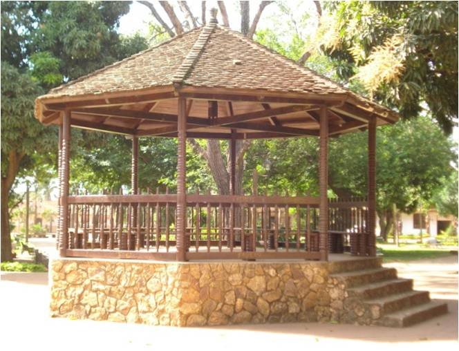 Kiosco de la plaza 31 de julio en San igncio de Velasco....construido de piedra y madera del Lugar...por las fraternidadres denominadas de Oriente y Velasco el año 1911